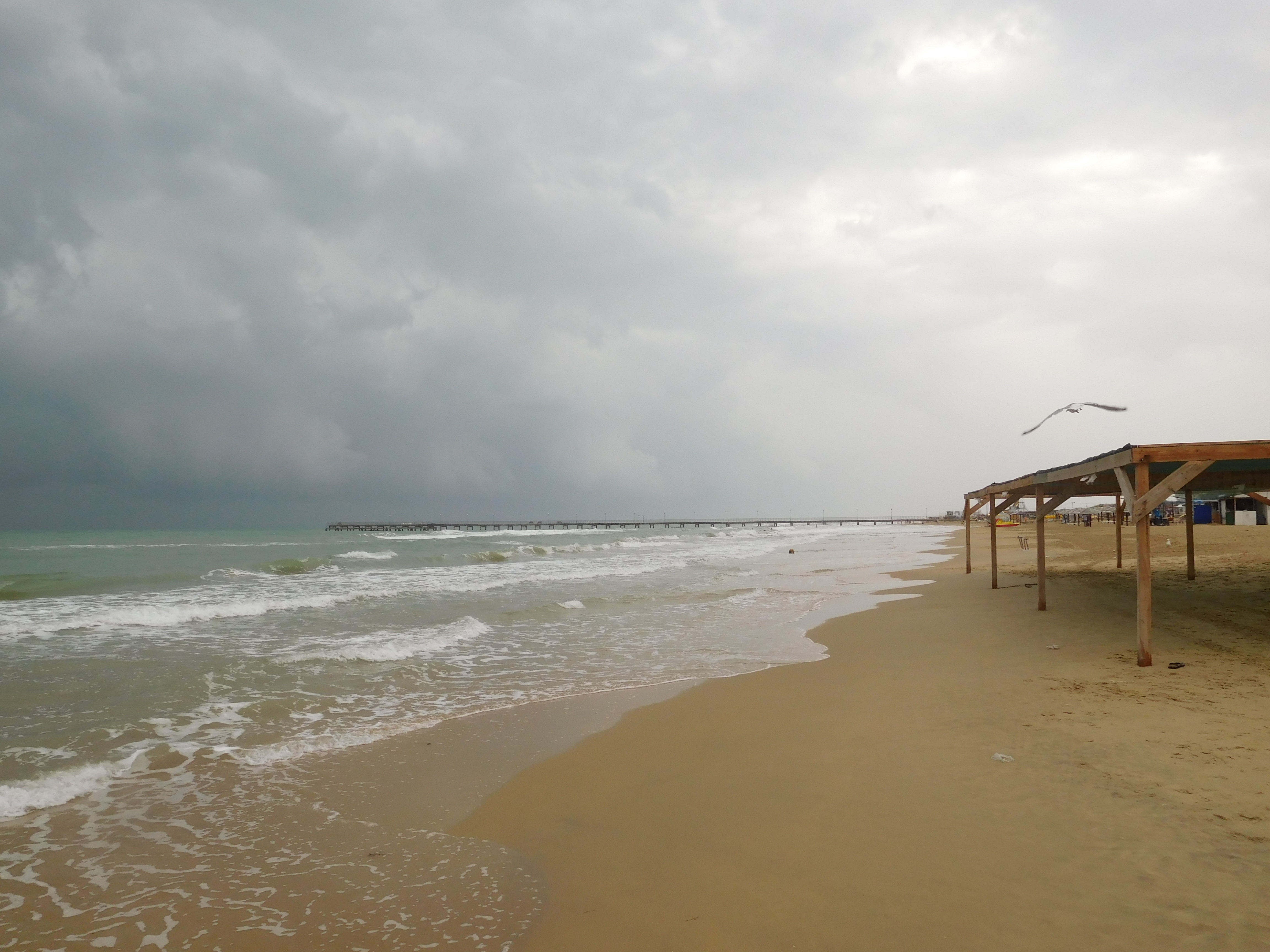 Осень на черноморском побережье в Витязево